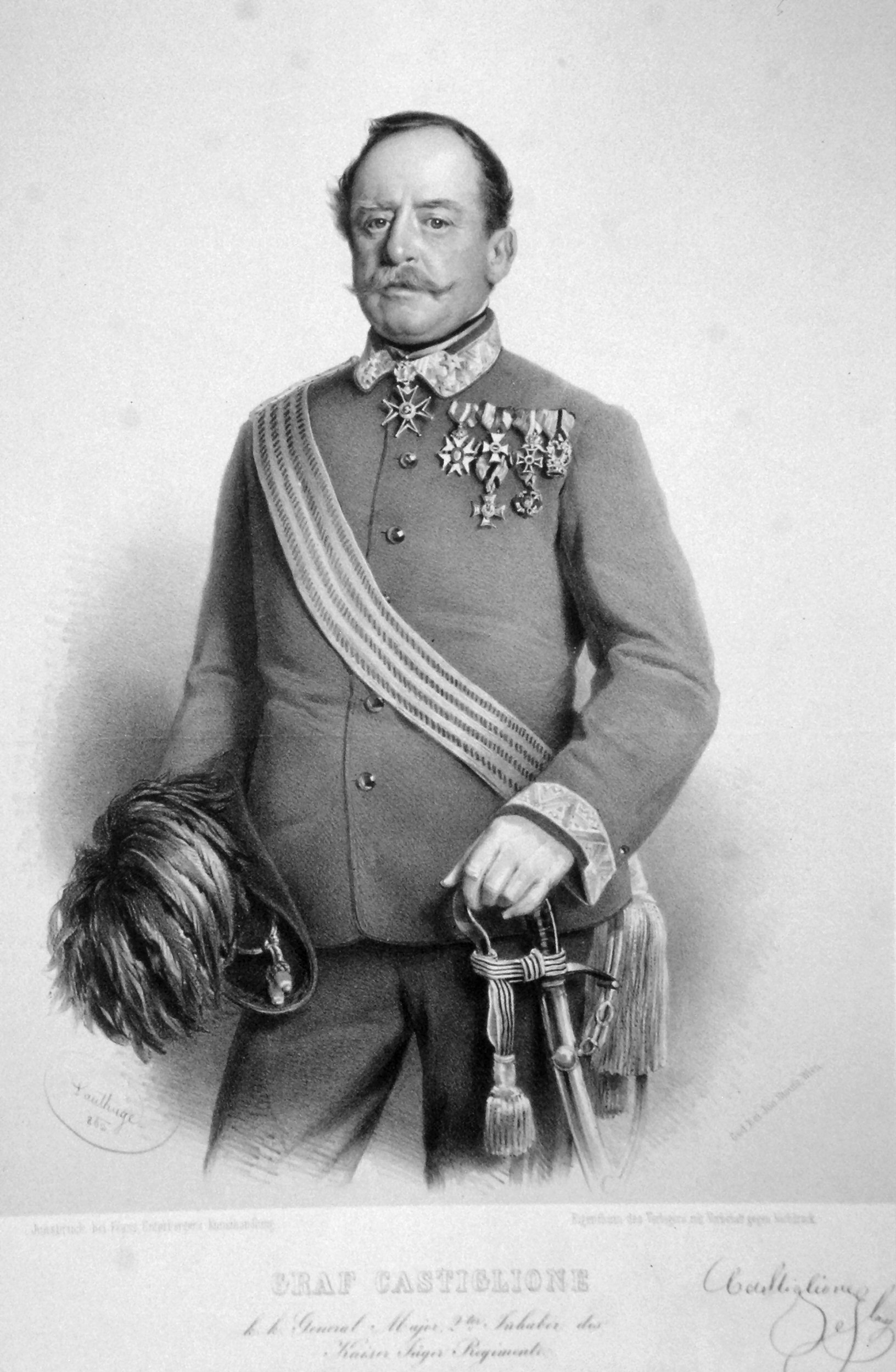 Johann Graf von Castiglione (1803 - 1871), Feldmarschalleutnant, Ritter des Maria-Theresien-Ordens, Lithographie von Adolf Dauthage,1862